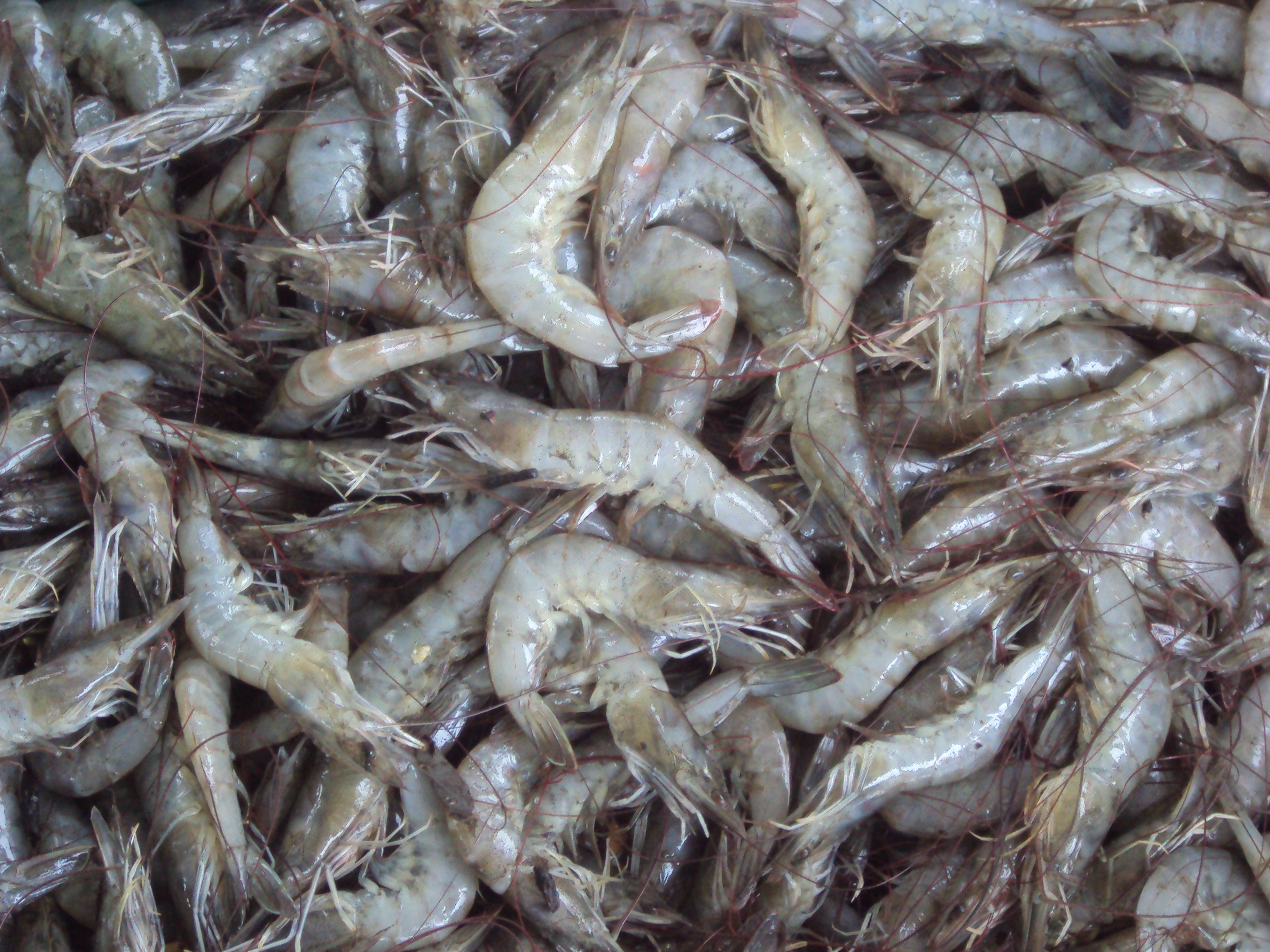 Camarones (Caridea) capturados en las marismas de Nayarit, México